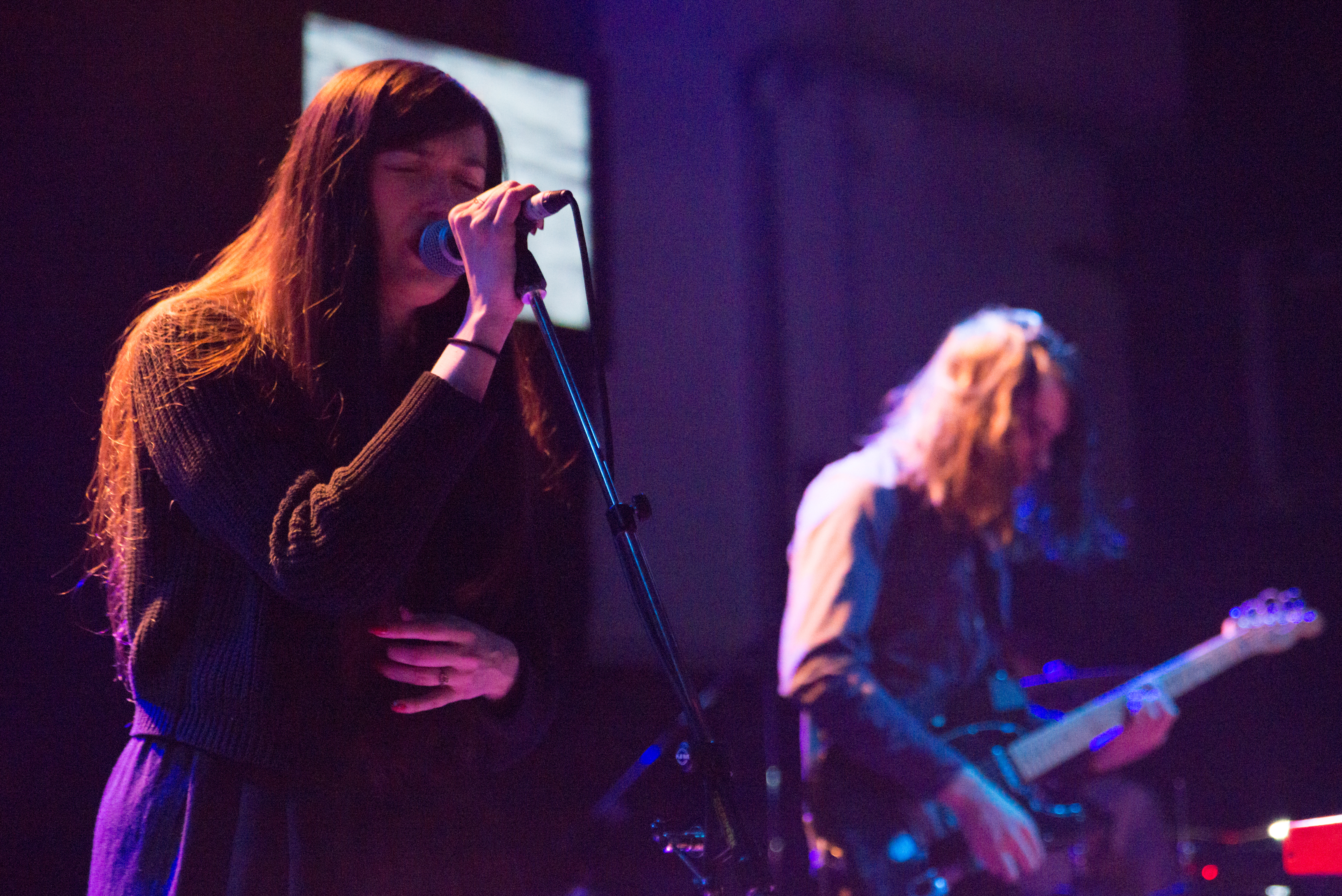 de Cults 2014 Muenchen Kranhalle